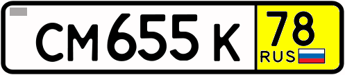 Транзитный номерной знак